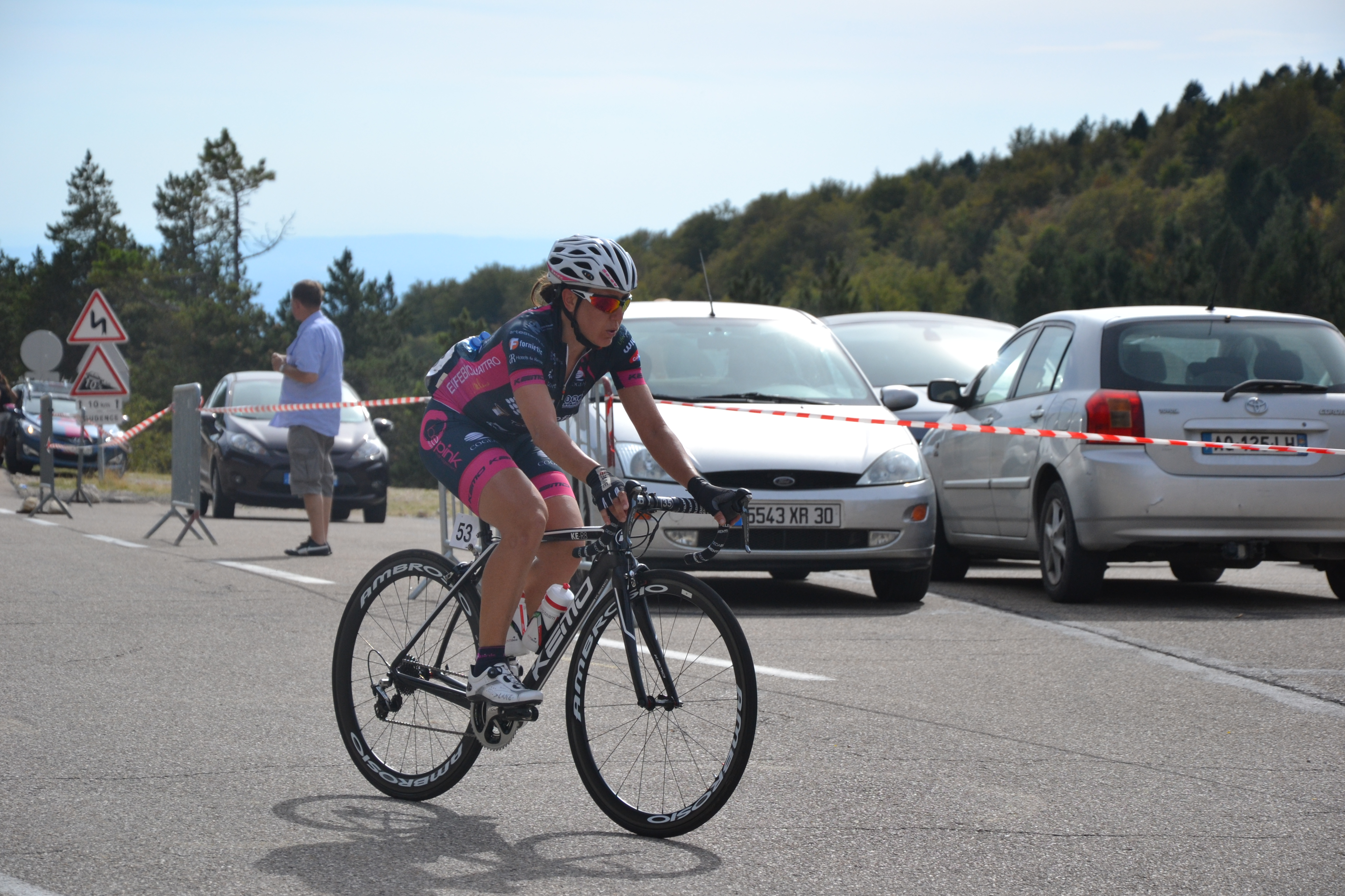 3ème étape du Tour féminin international de l'Ardèche 2016, lors de l’ascension du Mont Ventoux